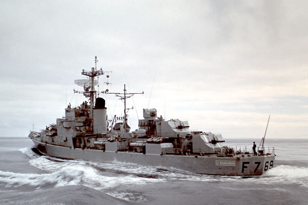 Escorteur rapide français Le Bourguignon F769 en 1970